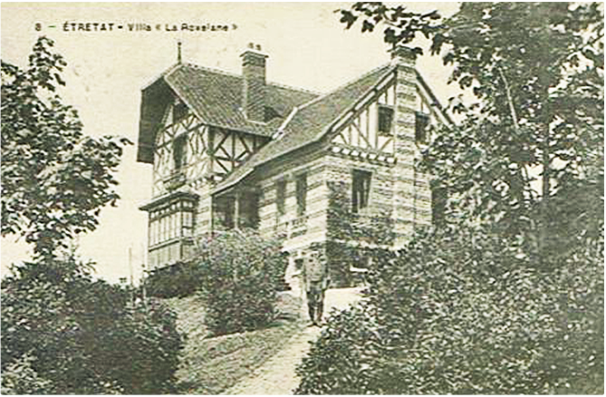 Villa Etretat